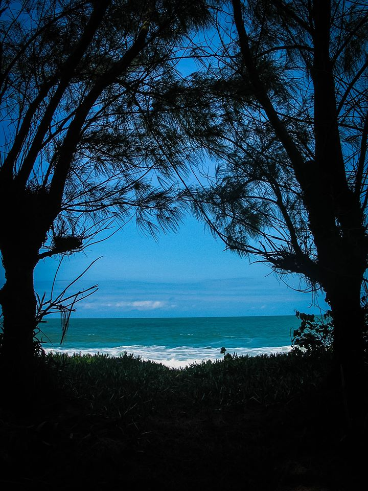 Foto tirada na Praia do Estaleiro, por cerca das 15:00 com uma camera Canon Powershot G3, infelizmente eu (o fotógrafo) não disponho de uma camera melhor.